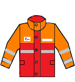 Chubasquero 112-SACYL